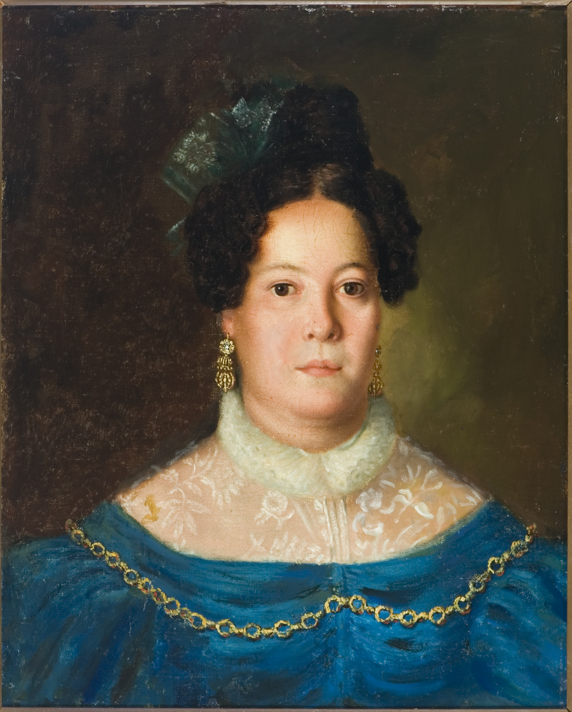 Obra que integra o acervo do Museu Paulista da USP. Coleção Fundo Museu Paulista.